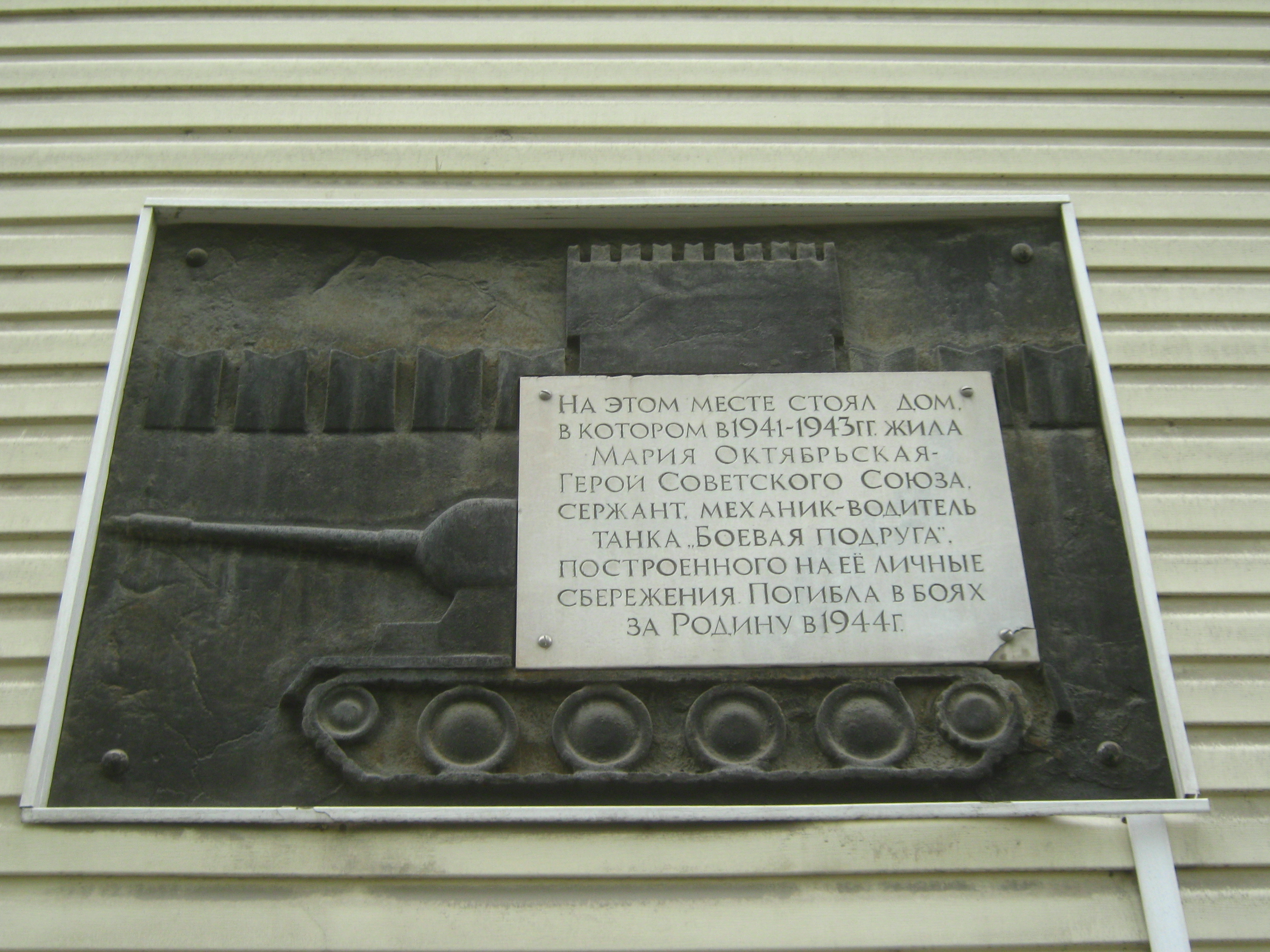 Белинского 39 - Кирова 5, Томск